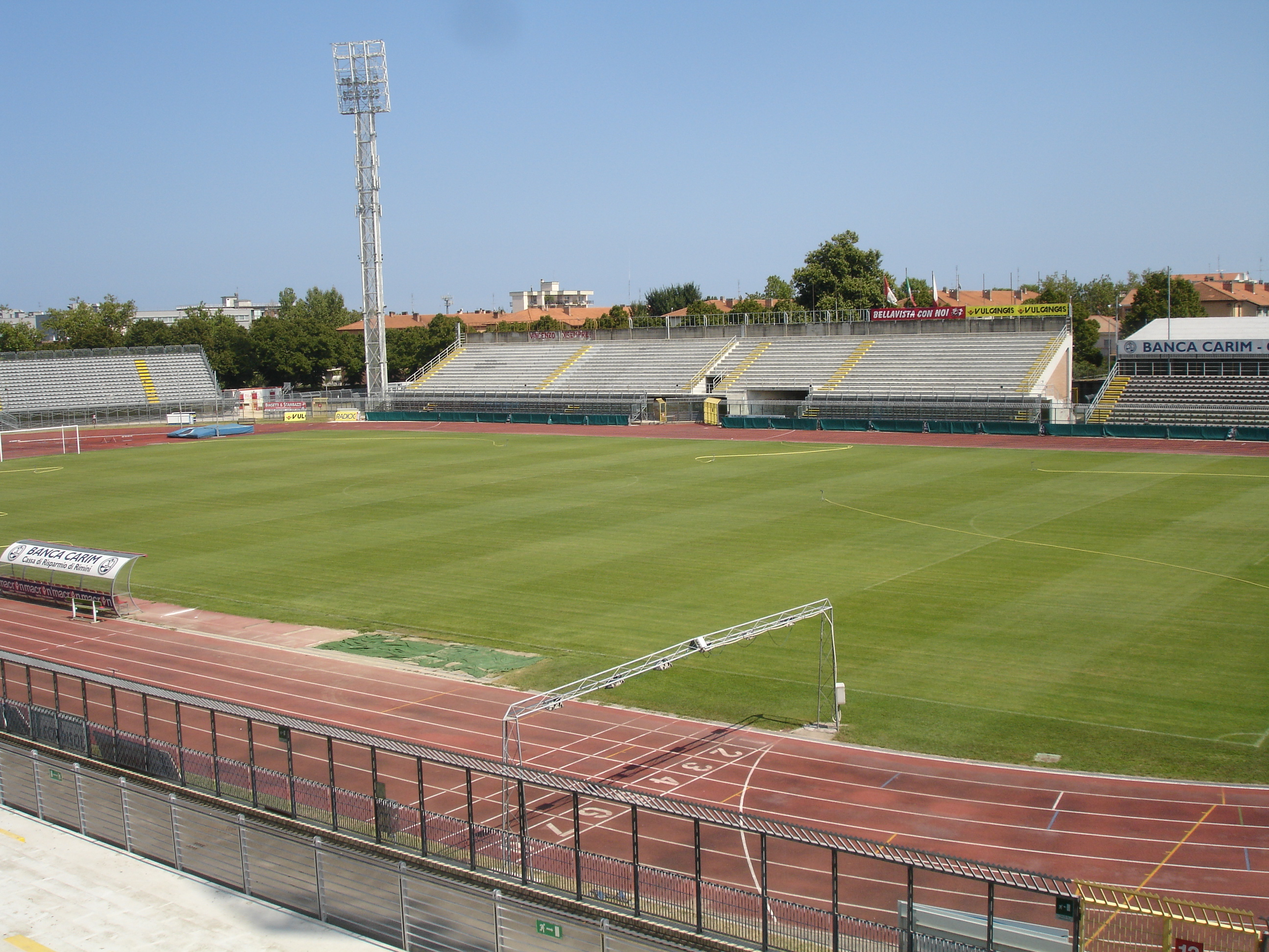 L'interno dello stadio Romeo Neri di Rimini.